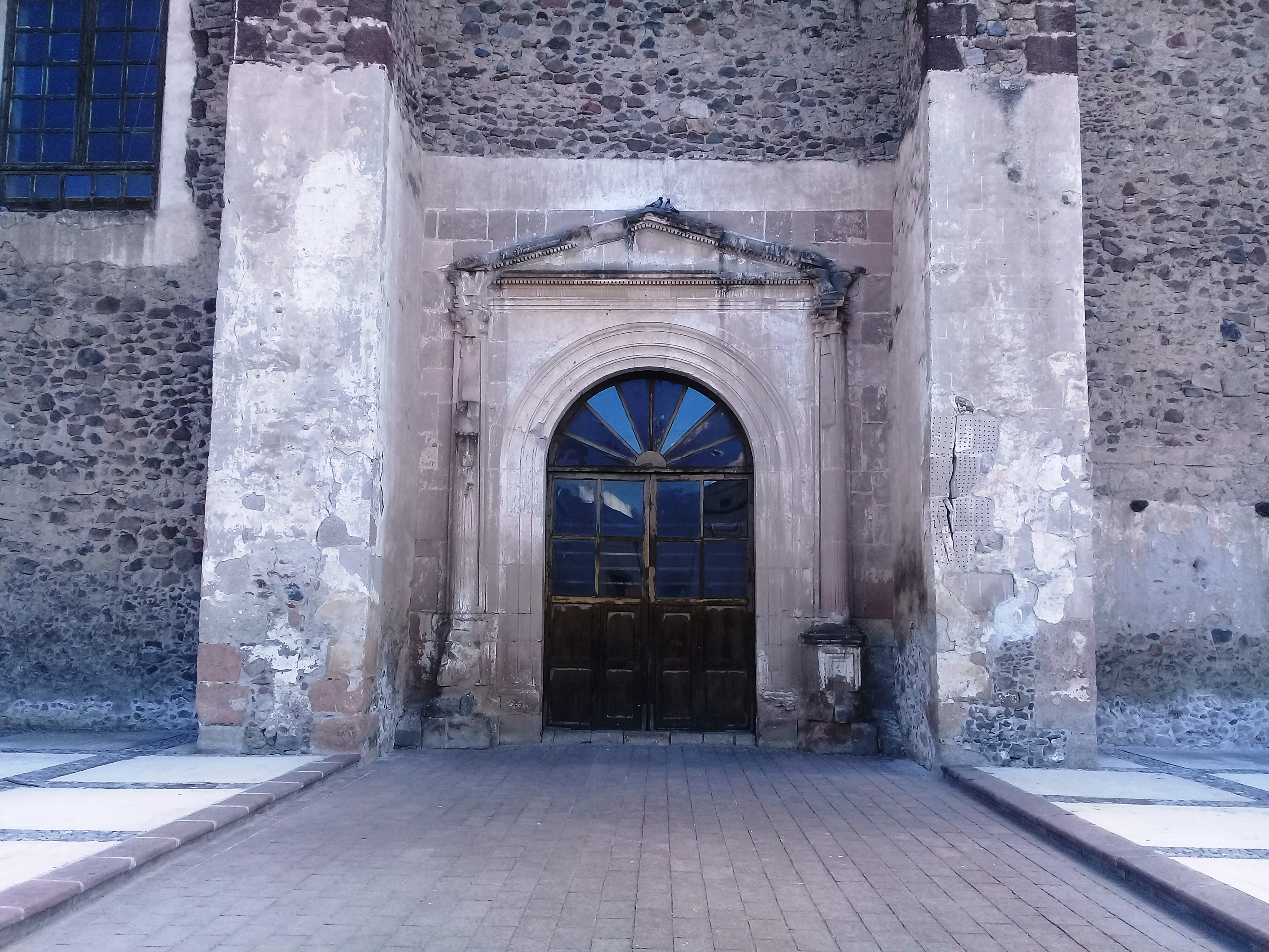 Templo y exconvento de San Nicolás de Tolentino (Actopan).